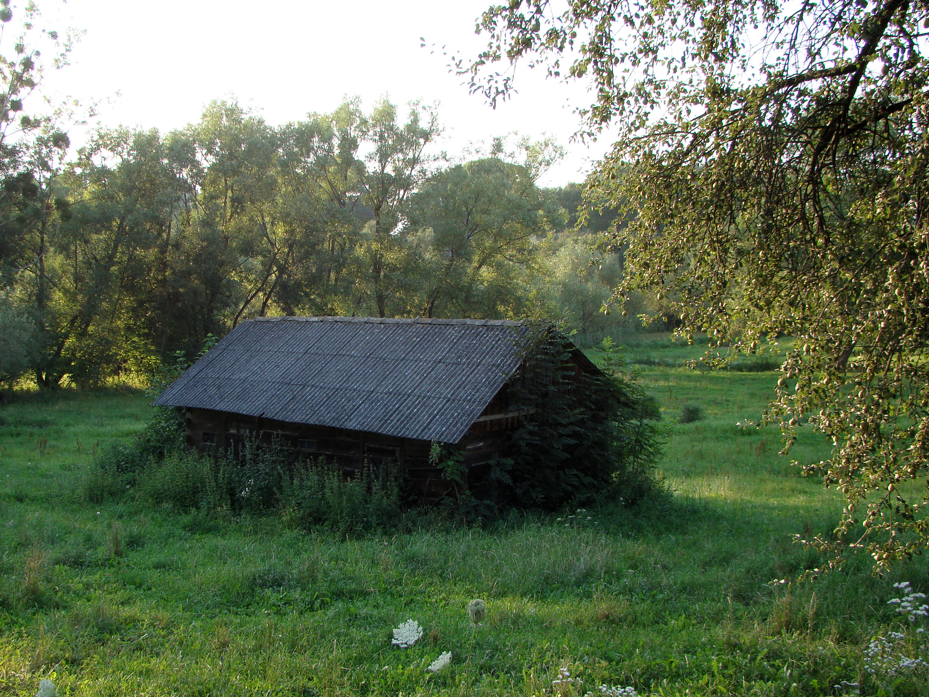 Dům v Dłuźniowě, Polsko